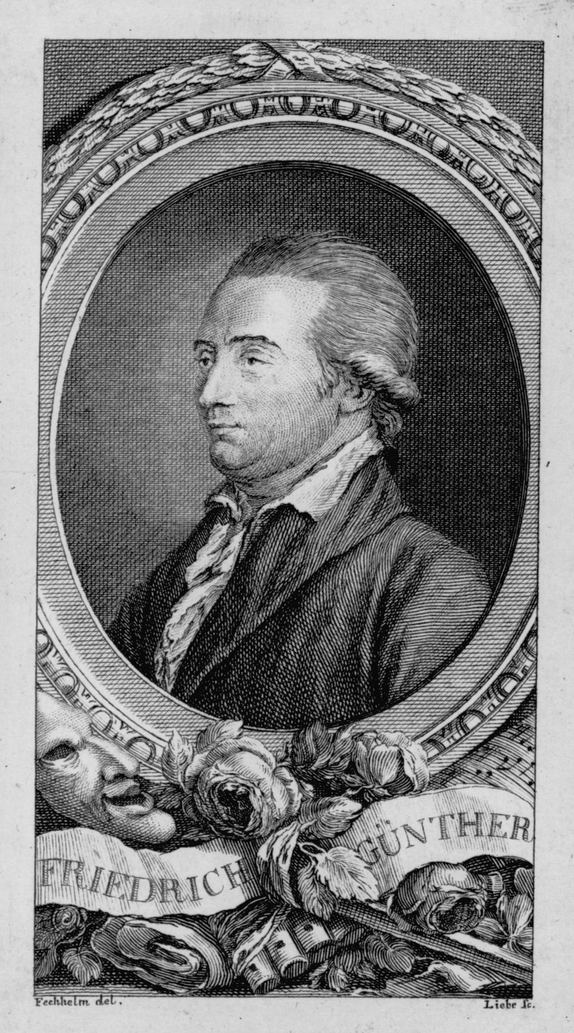 Friedrich Günther (1750–nach 1800), deutscher Theaterschauspieler